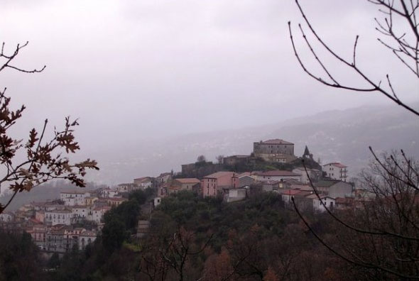 Il_Castello_di_Viggianello